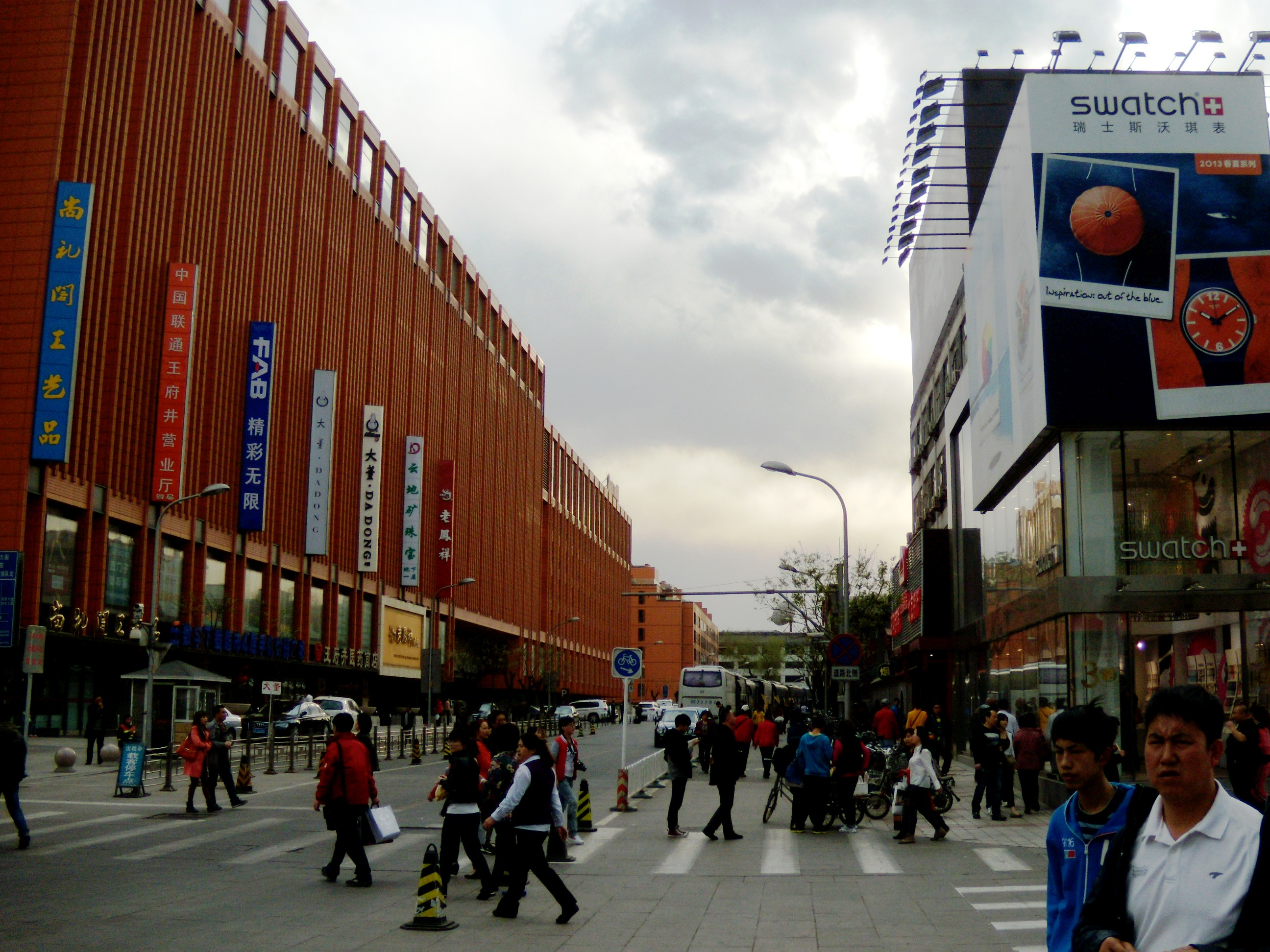 北京饭店二期北侧，位于王府井大街